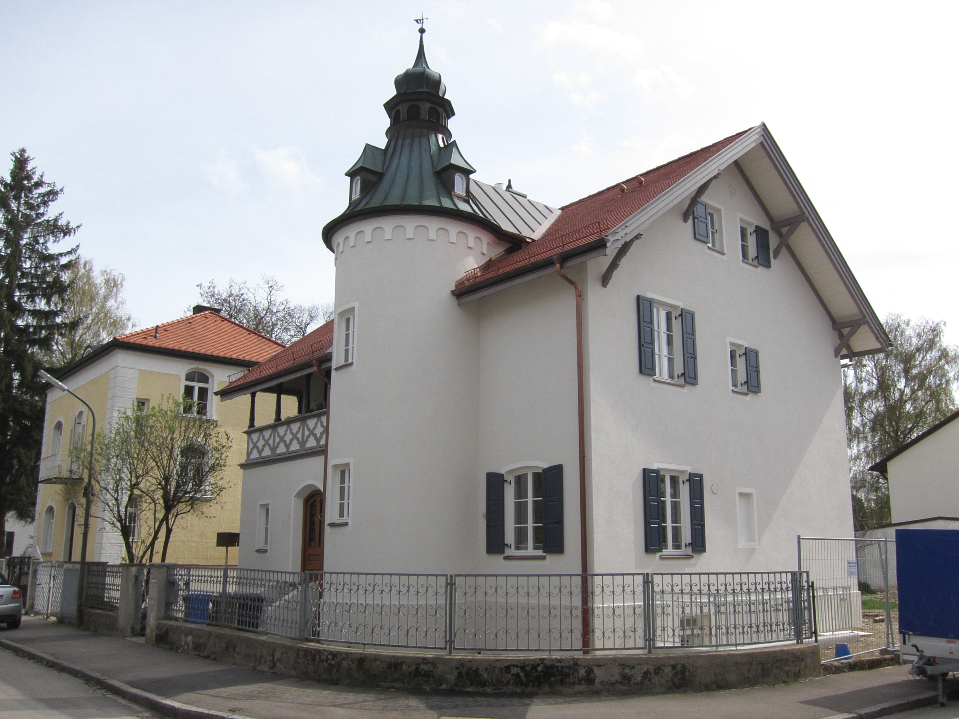 Lichtingerstraße 11; Wohnhaus mit Fachwerk und Turm, 1900 von Johann Schalk.